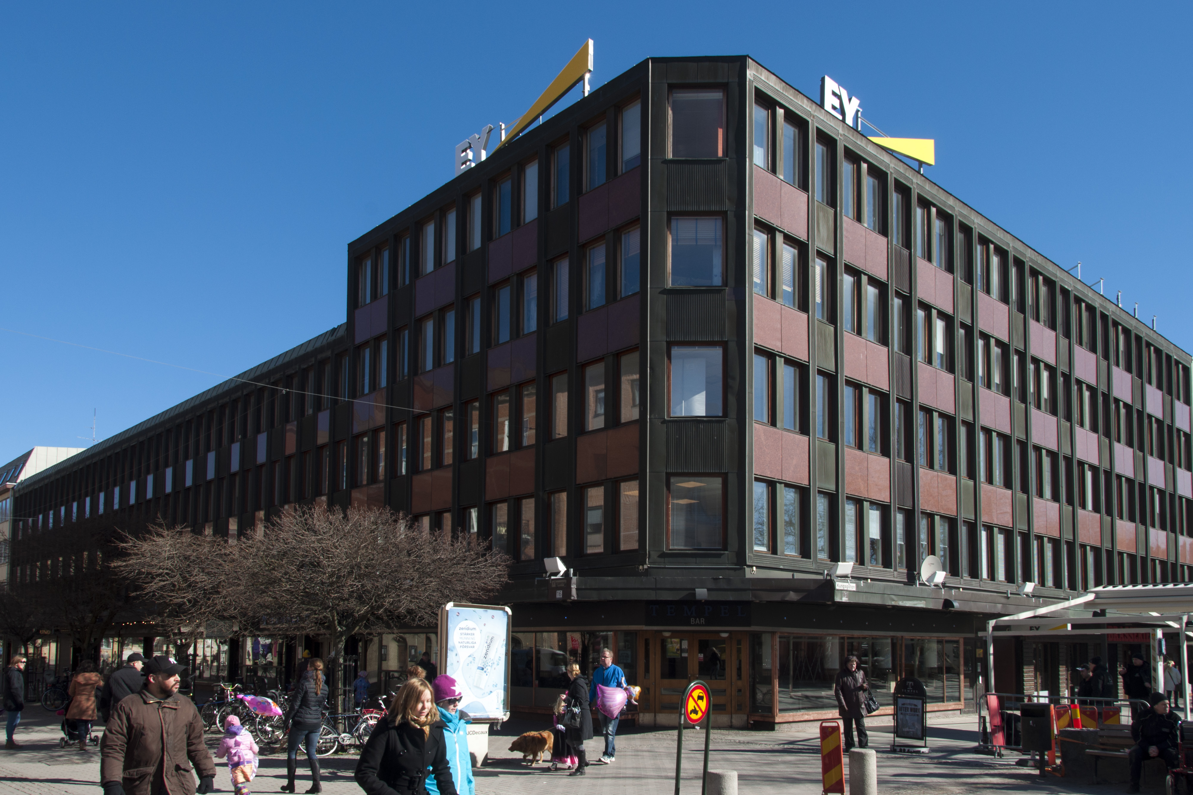 Enigheten 17, Kungsgatan 18, . Byggnadsår 1970. Arkitekt Lennart Illerstad